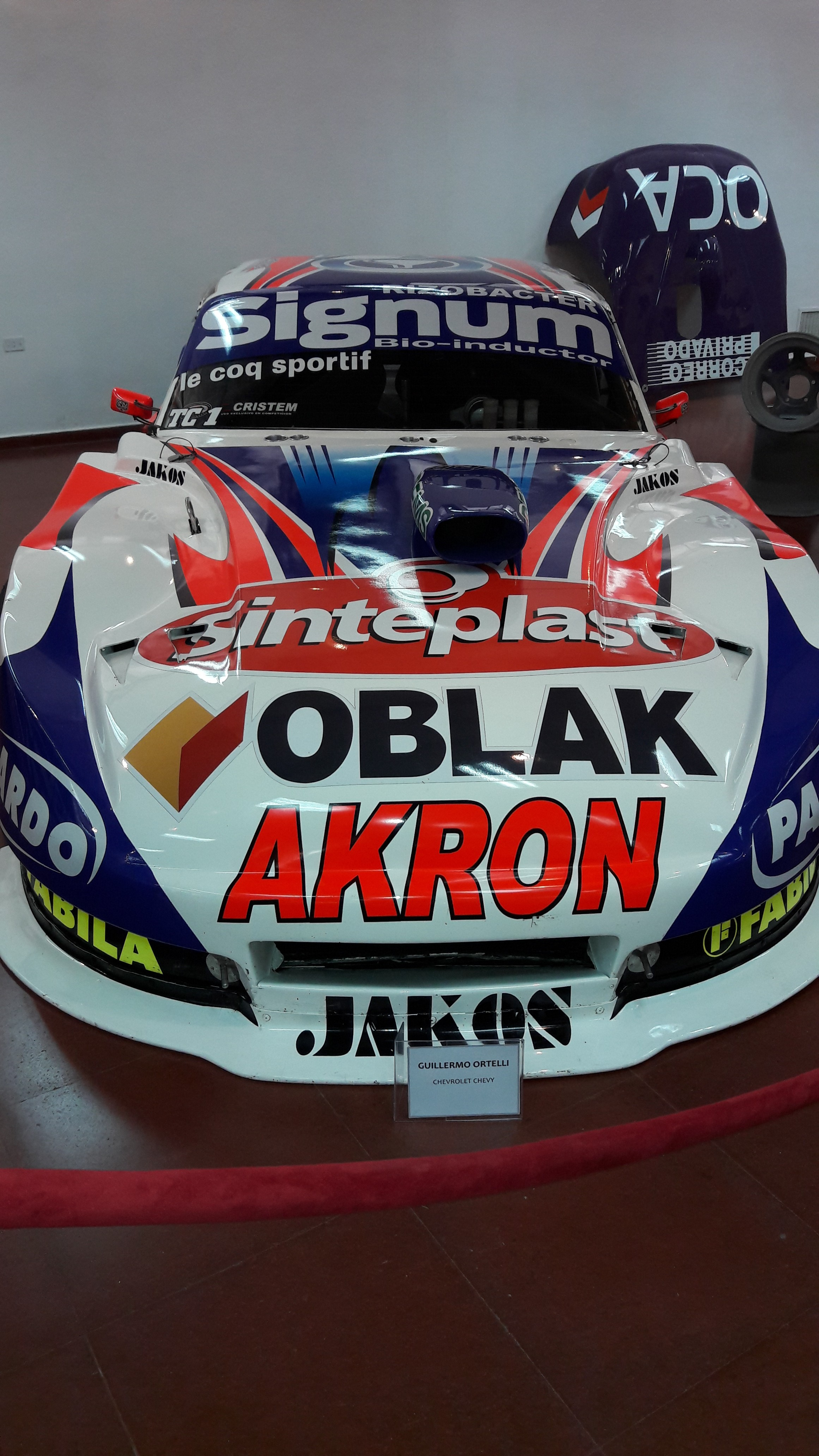 Chevrolet Chevy - Guillermo Ortelli. Expo Autos, Museo de Bellas Artes de Luján.